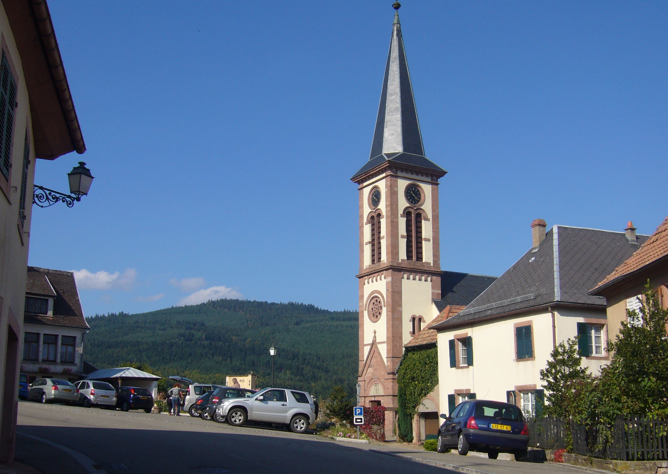 Église Sainte-Catherine de Thannenkirch